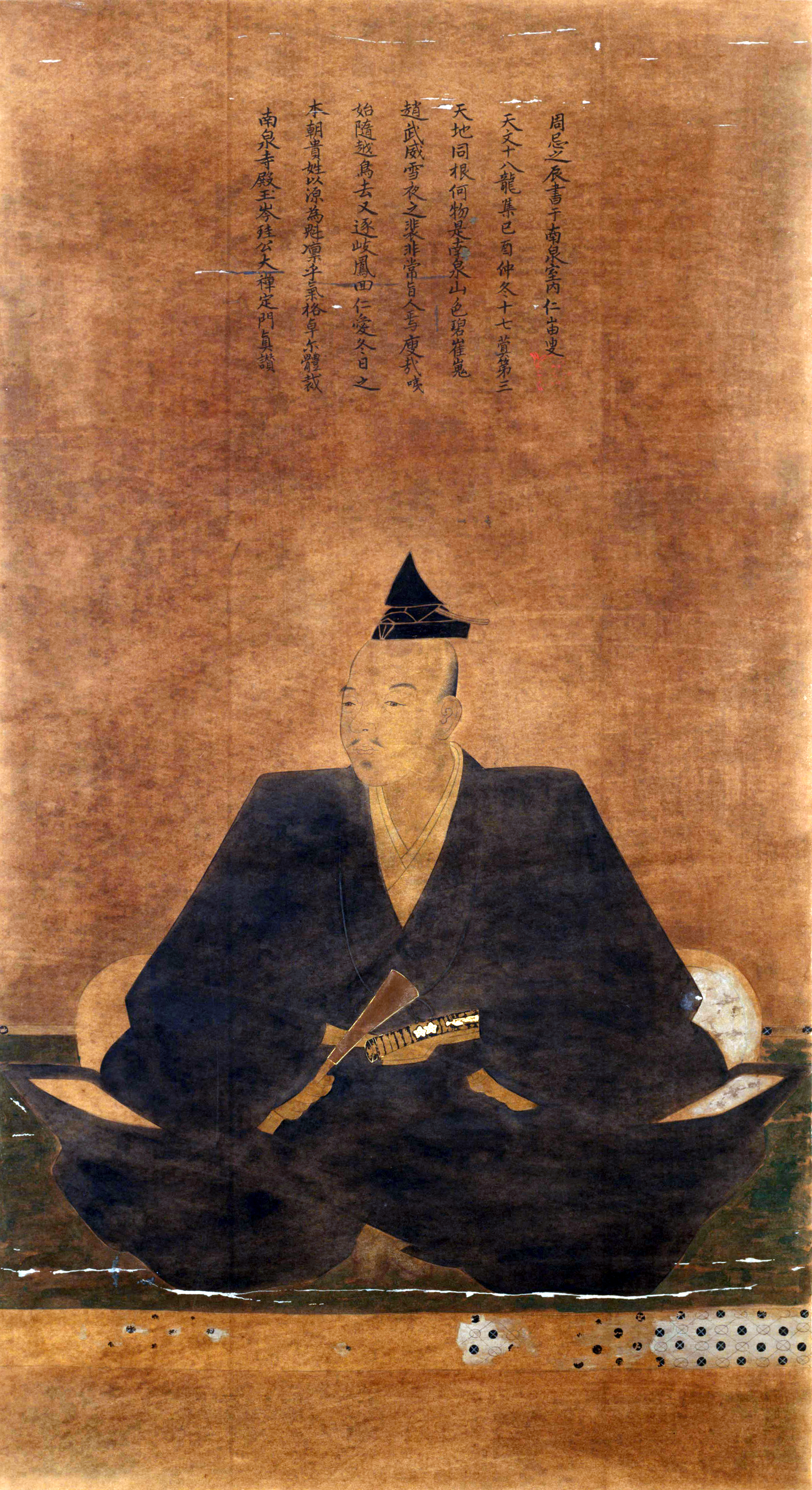 土岐頼純の肖像。